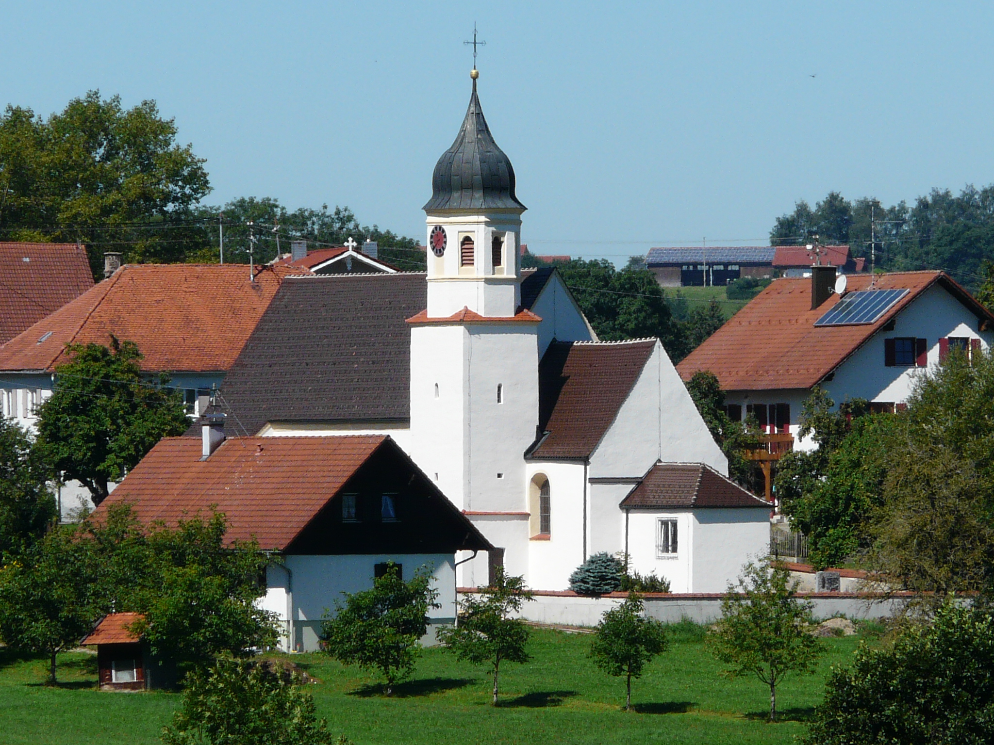 Kirche in Bayersried, Eggenthal